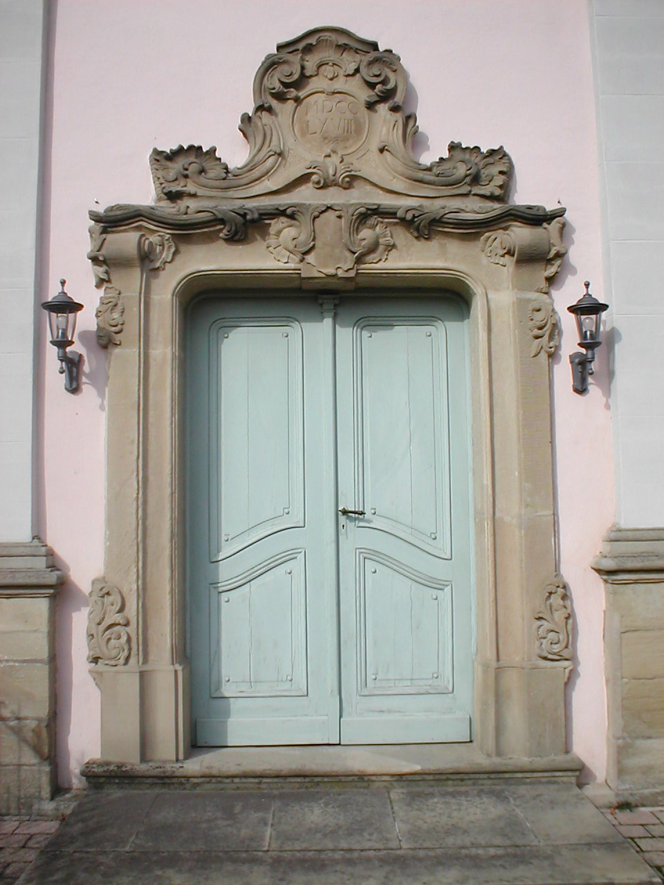 Portal der evangelischen Kirche von 1768 in Wollenberg